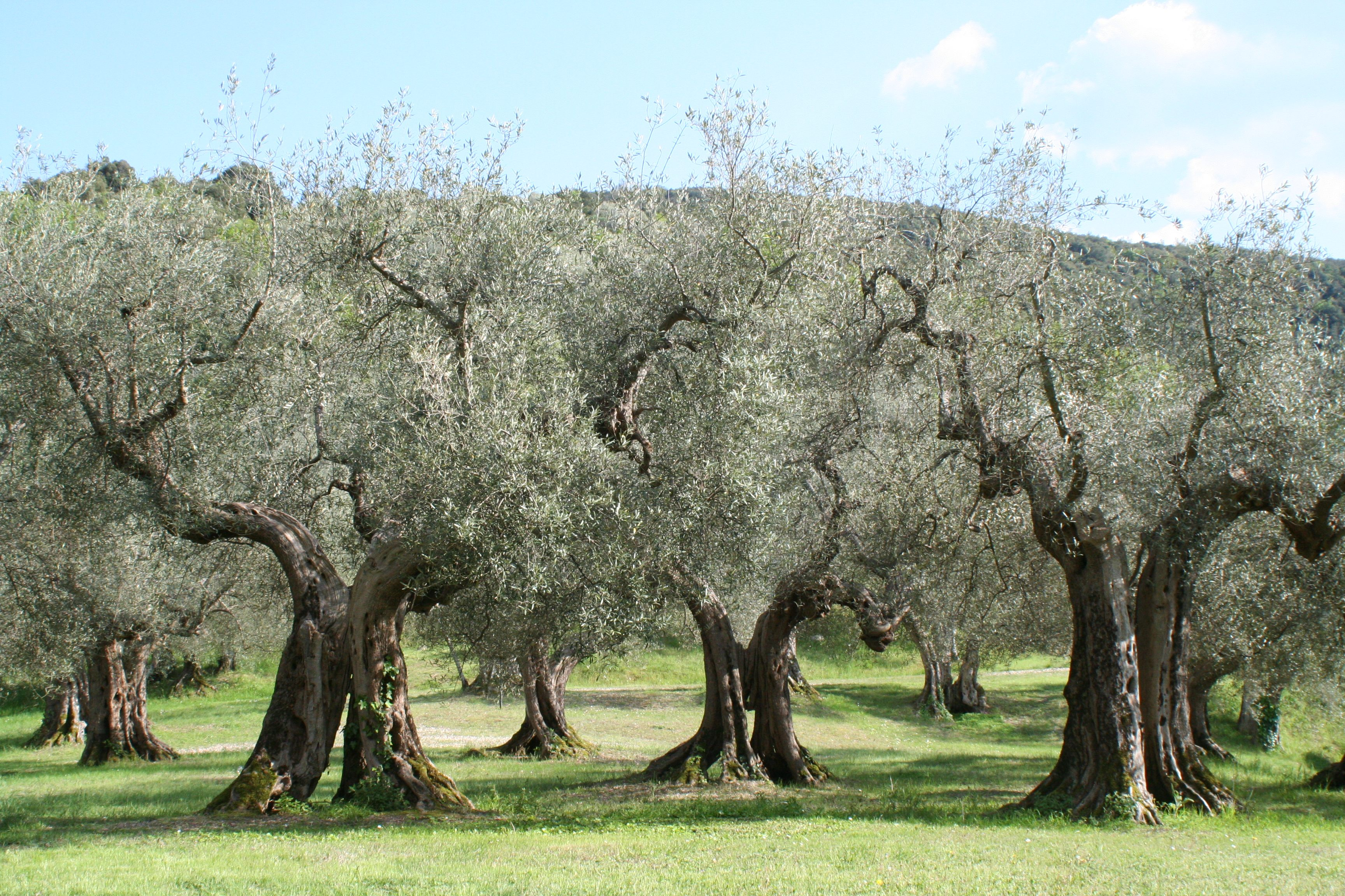 Olivenbäume in Umbrien